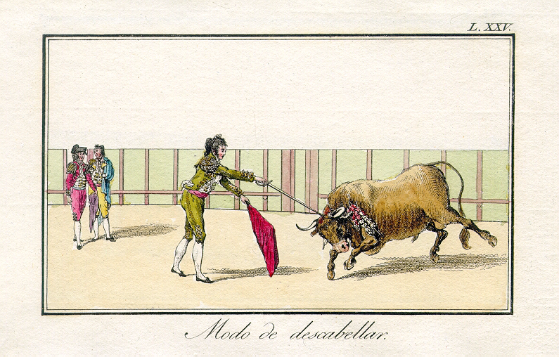 Delgado y Gálvez, José: Tauromaquia o arte de torear á caballo y á pie